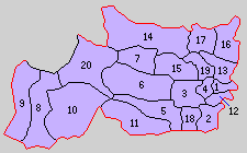 福島県安積郡の町村。